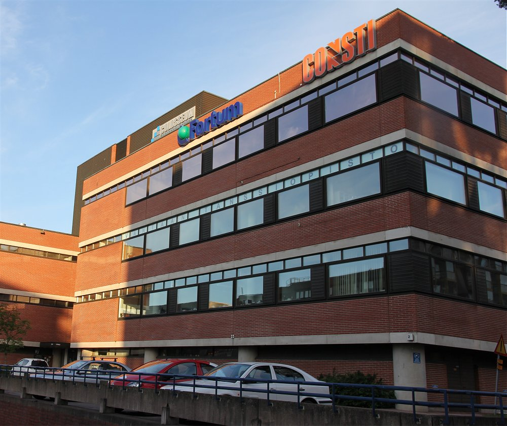 Toimistotalokompleksi Colosseumin Kilterinkuja 2:n rakennus Vantaan Myyrmäessä. Kesällä 2016 rakennuksessa oli esimerkiksi Fortumin, Consitin ja Vantaan tanssiopiston toimintoja.